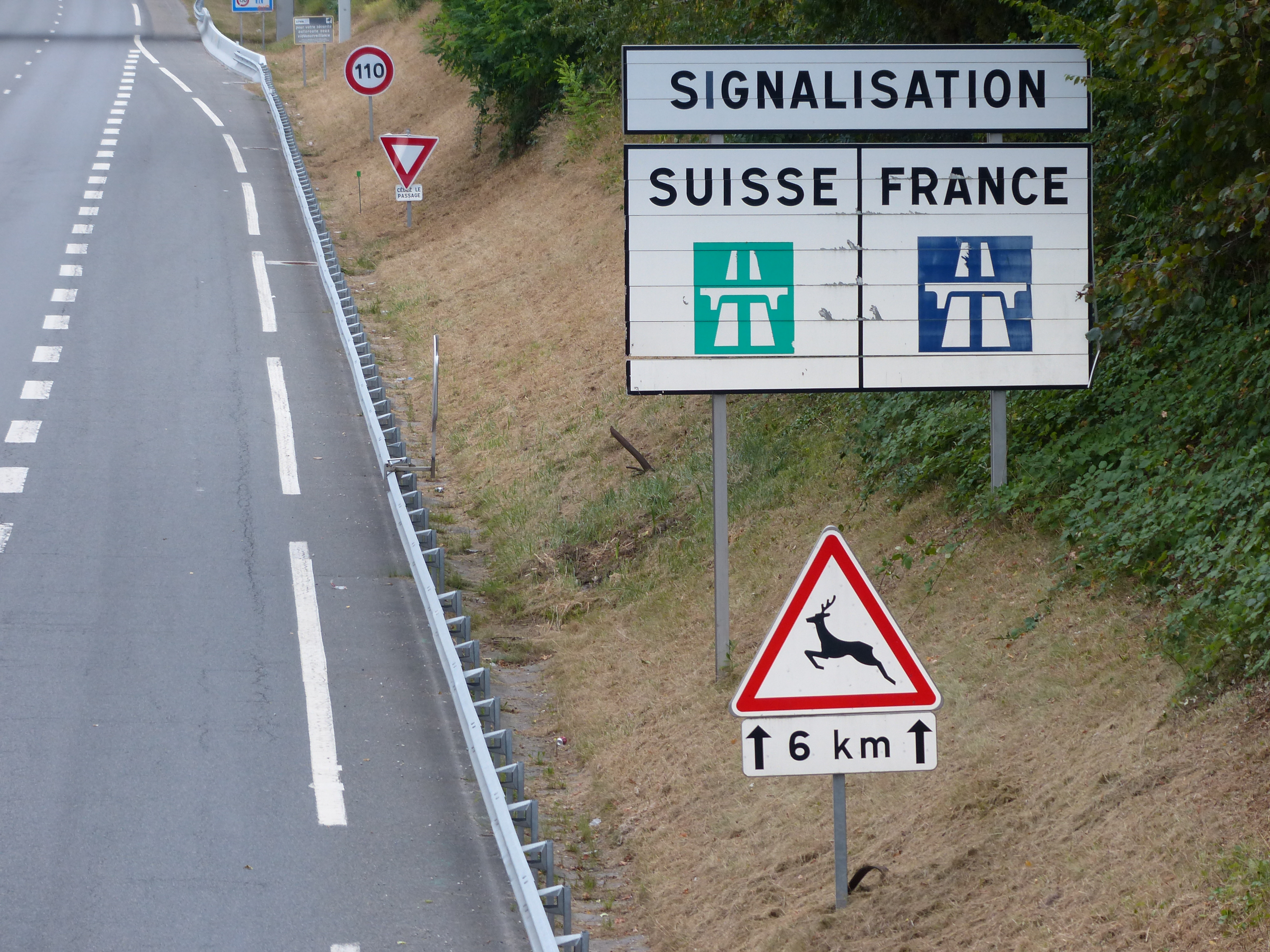 panneaux A15b, M2, et signalisation Suisse France, sur l'A411 à Gaillard, Haute-Savoie.